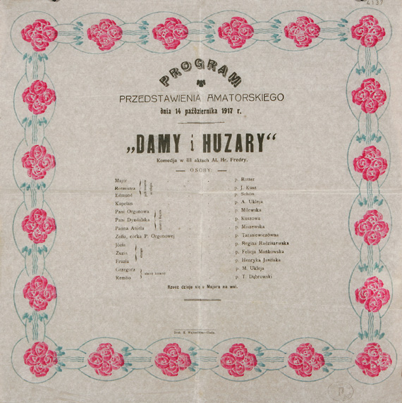 Damy i huzary: komedja w 3 aktach Al. hr. Fredry, 14 października 1915, druk M. Wajsztejna, Chełm: program teatralny